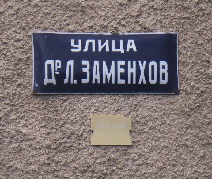 Улица Др Л. Заменхоф в Карлово (2005)